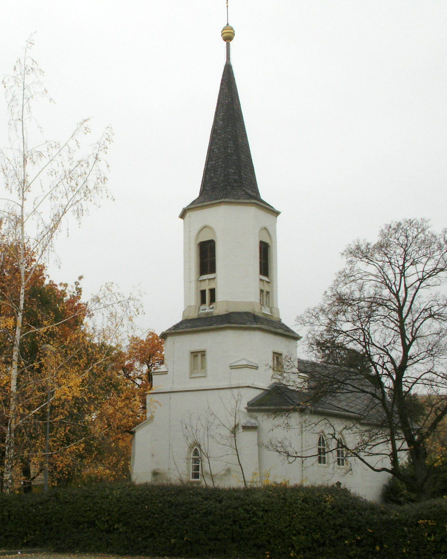 Alte Kirche im Leipziger Stadtteil Schönau